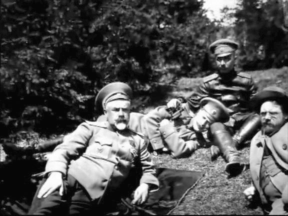 Деникин на фронте Первой мировой войны